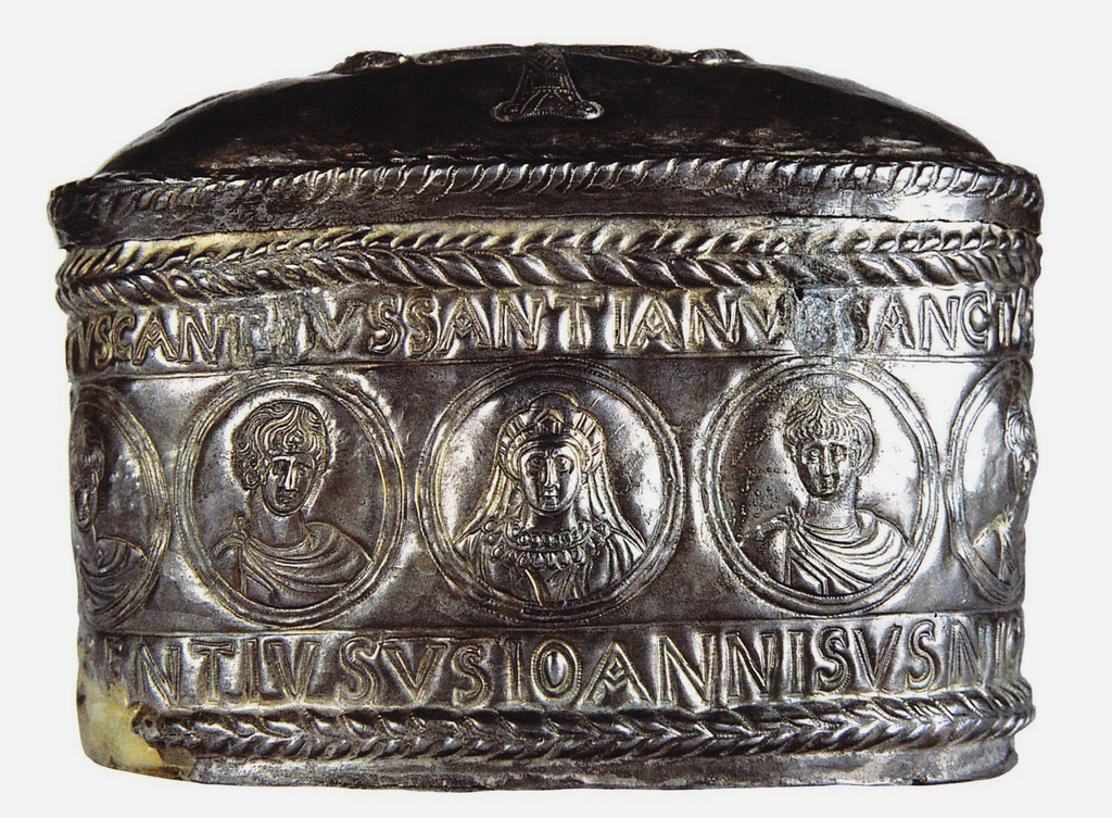 Capsella reliquiario, IV-V d.C. Materiali argento Collocazione Tesoro del Duomo, Grado